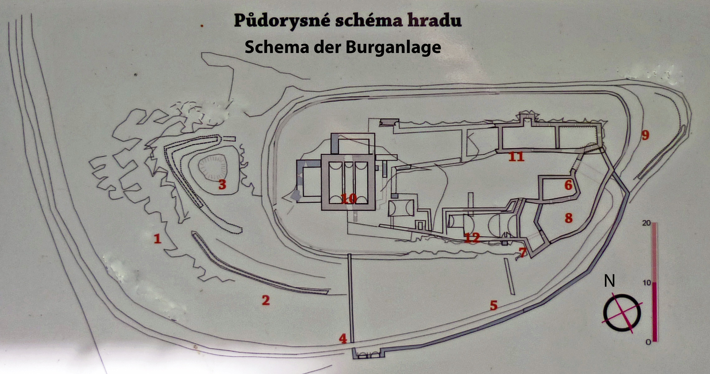 Plan der Burgruine Schönburg (Hrad Šumburk - Šumná): 1 Steinbruch, 2 Befestigung, 3 Vor-Bastion, 4 erstes Tor, 5 zweites Tor, 6 drittes Tor, 7 Turm, 8 Graben, 9 östliches Plateau, 10 Wohnturm, 11 Palas mit Kapelle, 12. Palas